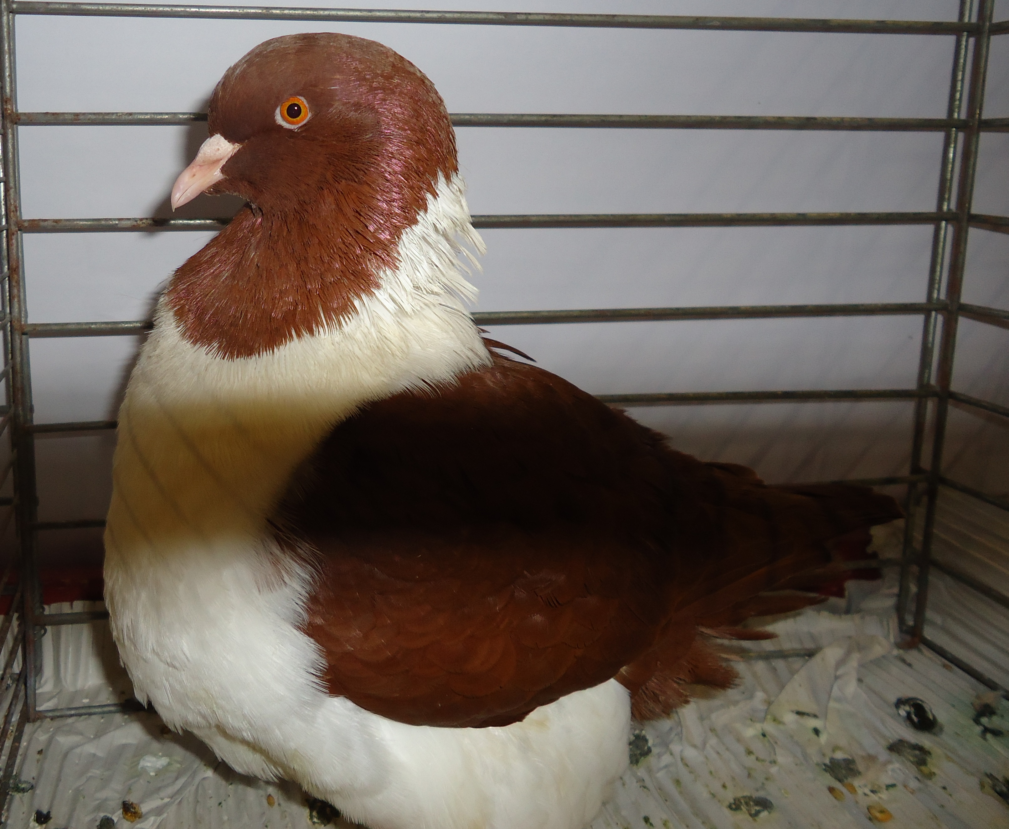 Pigeon Strasser